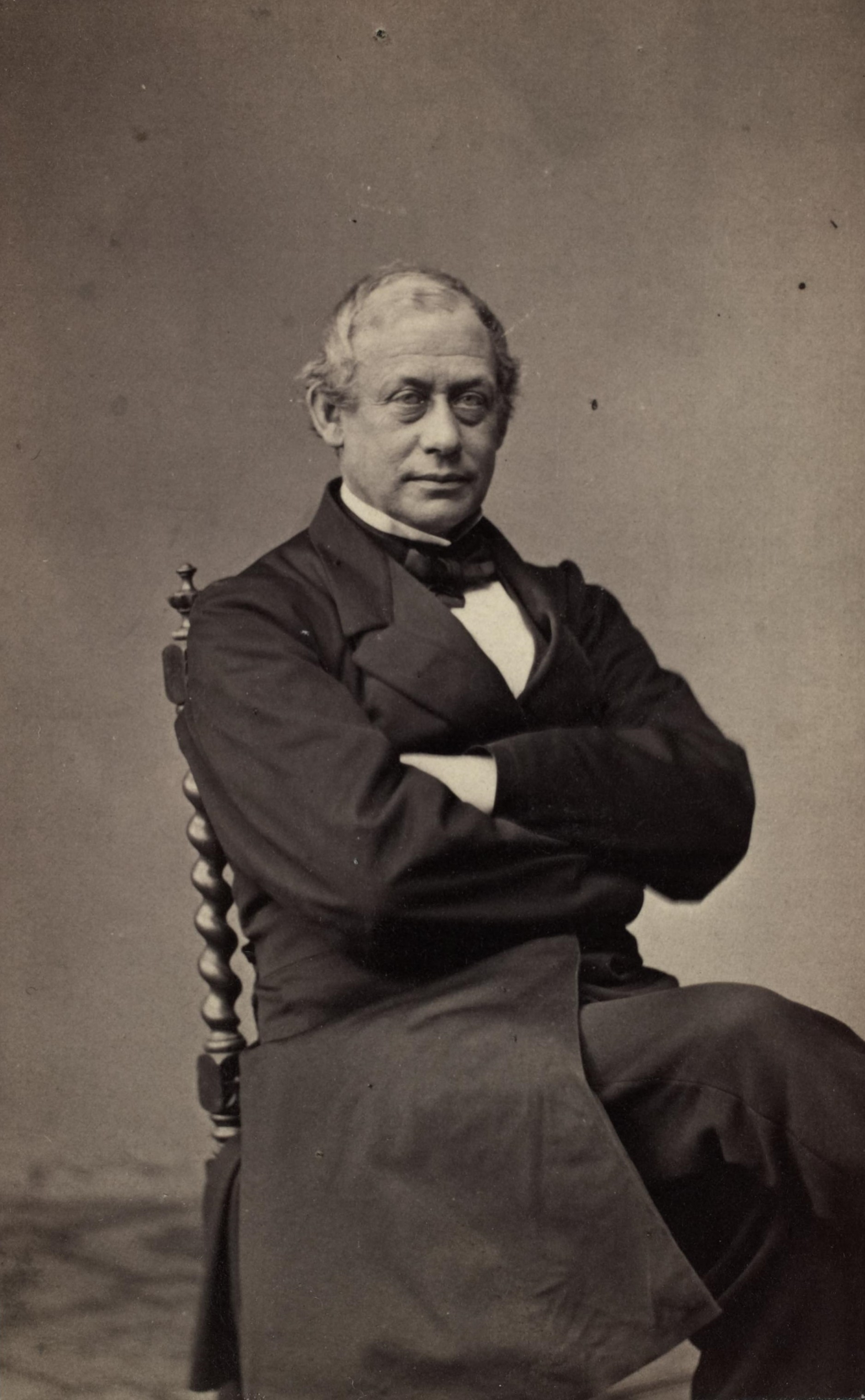 Frederik Stang (1808 - 1884), Norwegian Prime minister 1861-1880